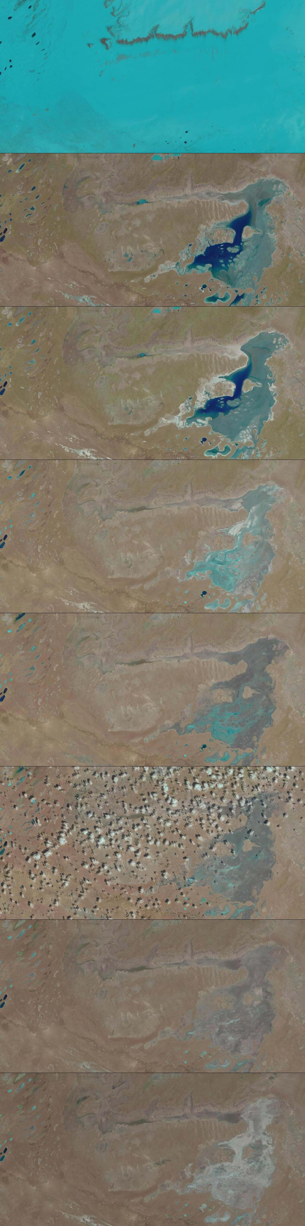 Typische Wasserführung des Schalkartengis, beispielhaft am Jahr 2014 dargestellt. Die einzelnen Aufnahmen stammen vom 15.3., 16.4., 2.5., 3.6., 19.6., 21.7., 7.9. und 23.9. und wurden von Landsat 8 aufgenommen.